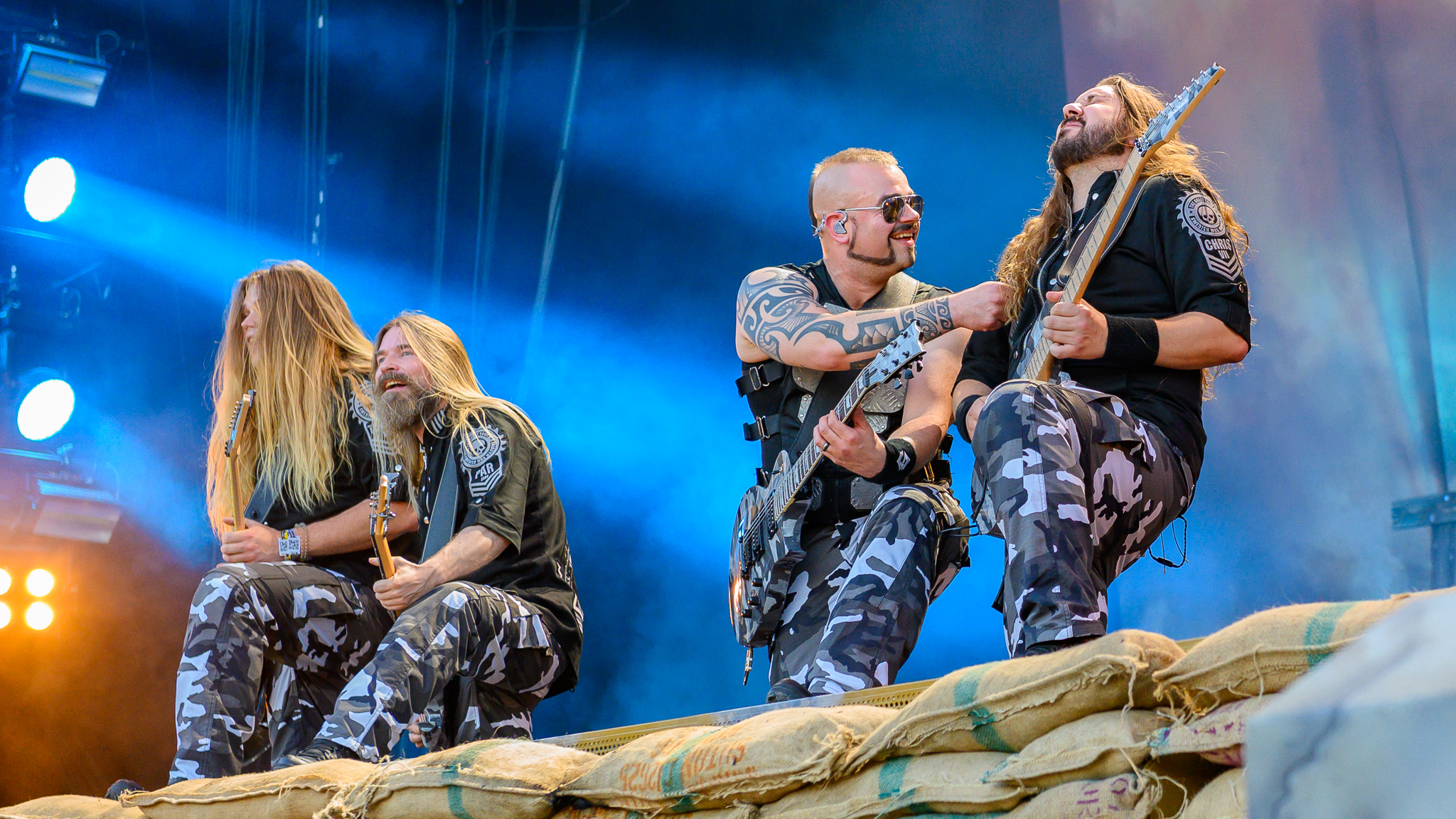 ARGO-Konzerte,Beck's Park Stage,Chris Rörland,Joakim Brodén,Konzert,Livekonzert,Livemusik,Musik,Pär Sundström,RiP,Rock im Park 2019,Sabaton,Tommy Johansson